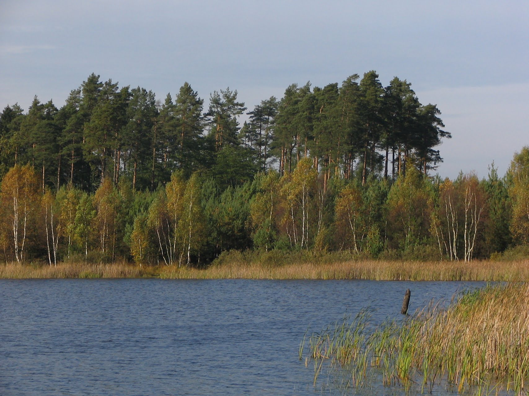 Jezioro Czarne